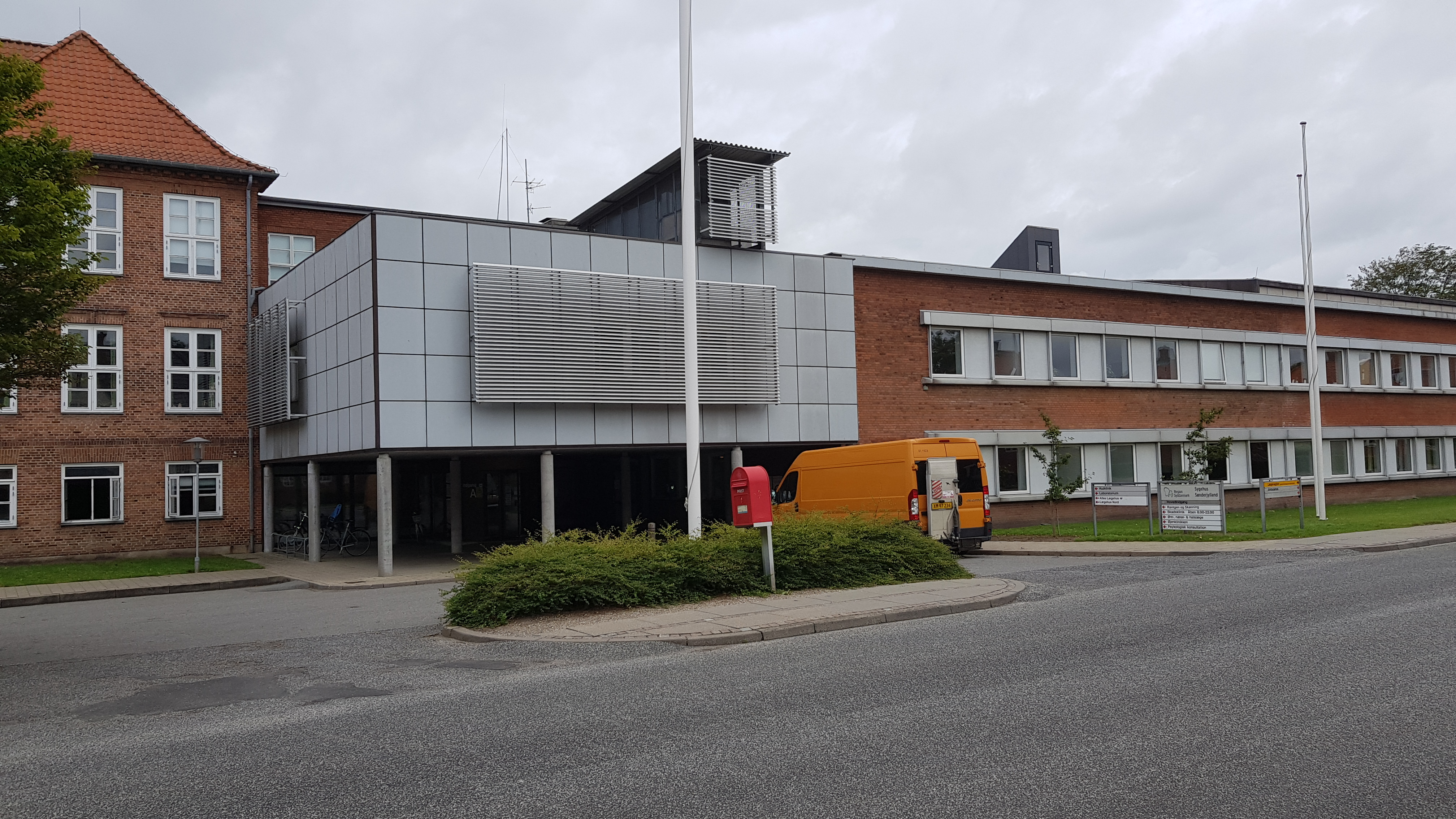 Tønder Sygehus